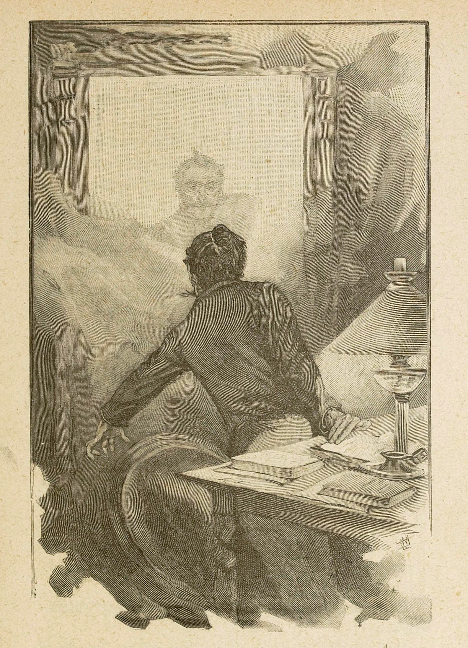 Illustration de la nouvelle de Maupassant, Le Horla. Gravure sur bois de Gorges Lemoine d'après un dessin de William Julian-Damazy (1865-1910).